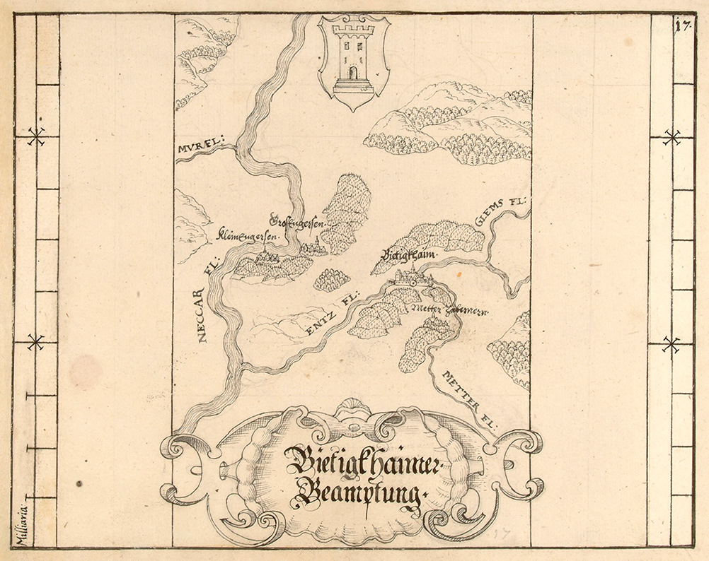 „Bietigkhaimer Beamptung“ (Amt Bietigheim) – Blatt 19 in der „Beschreibung des Hertzogtums Württemberg ob der Staig und under der Staig“ [Atlas der Ämter des Herzogtums Württemberg]